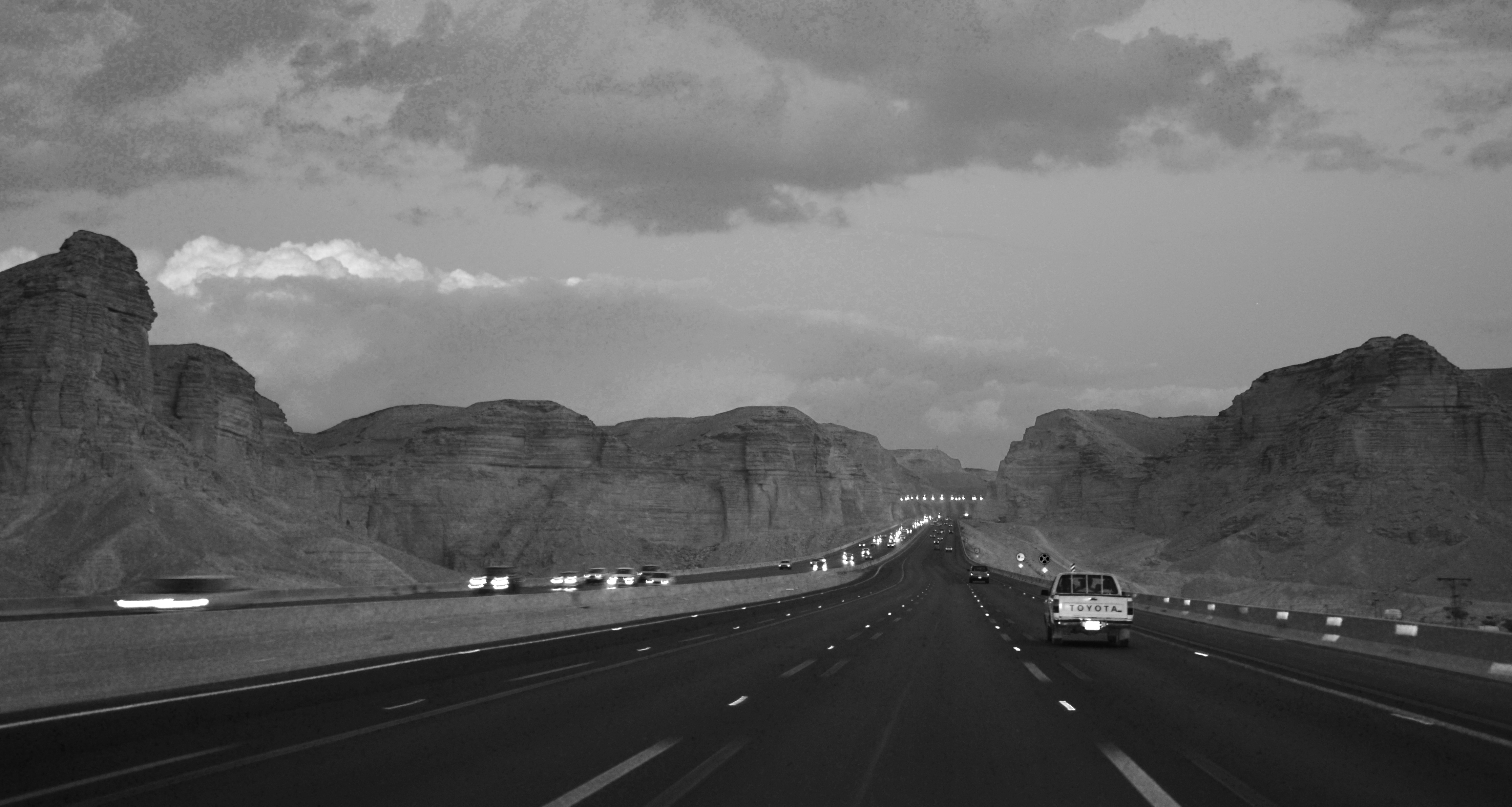 Riyadh